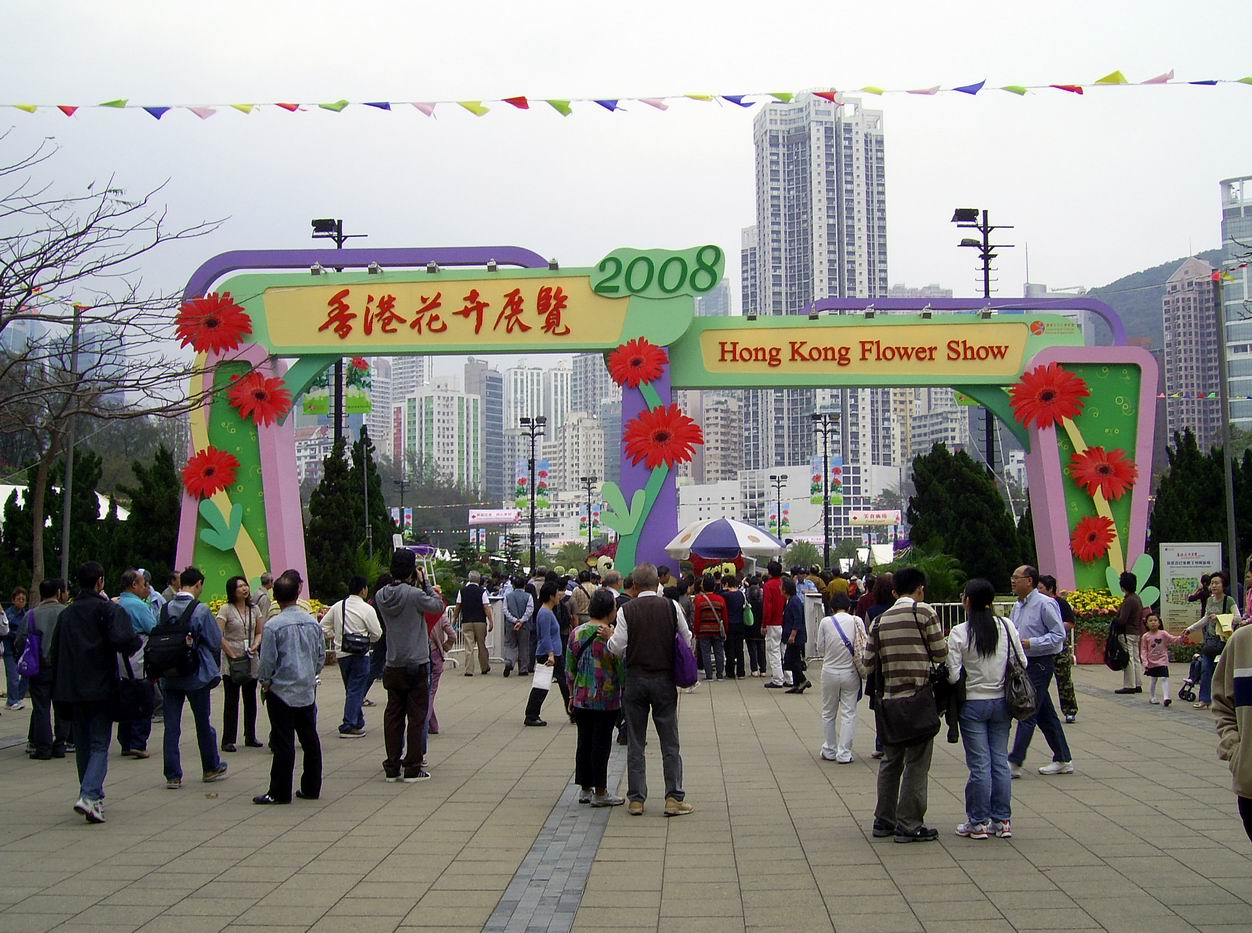 2008年香港花卉展覽的入口